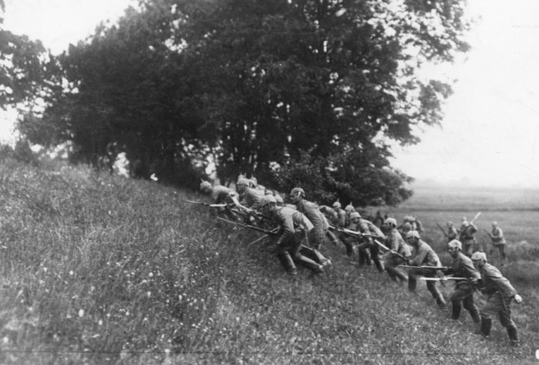 Frankreich, Argonnerwald, Vorgehen von Infanterie Scherl: I. Weltkrieg 1914-1918 Westfront-Frankreich, Vorwärts im Argonnenwald, Herbst 1915 12881-15